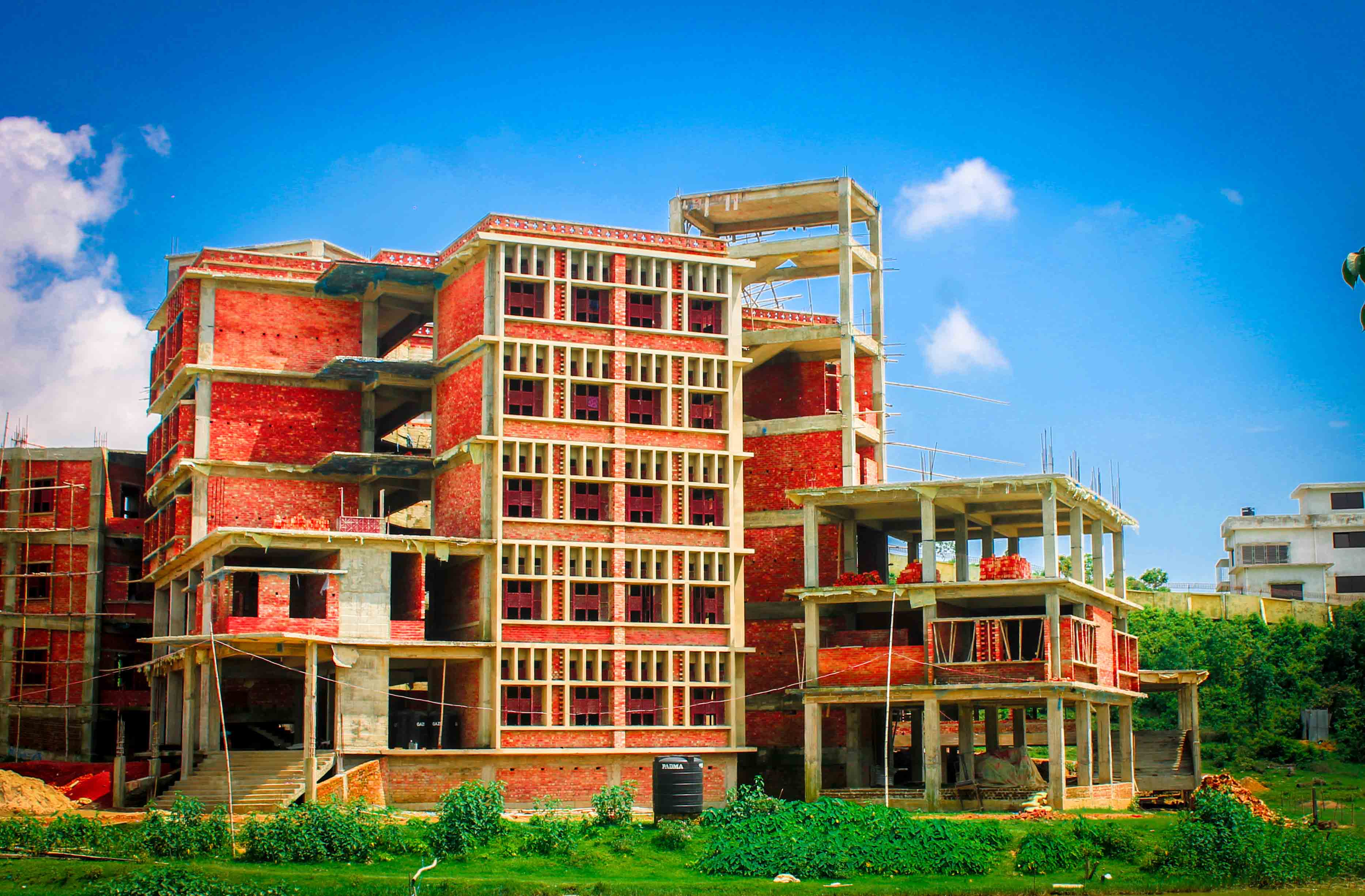 কৃষি প্রকৌশল ও কারিগরি অনুষদের নির্মিতব্য ভবন।